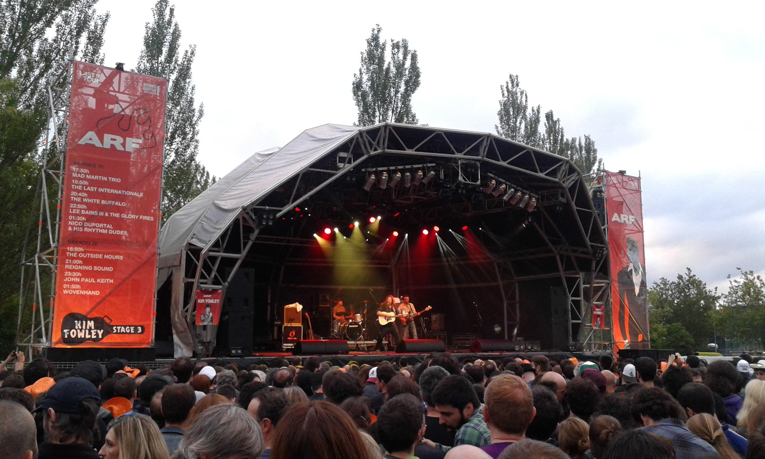 White Buffalo Gasteizen 2015-6-19